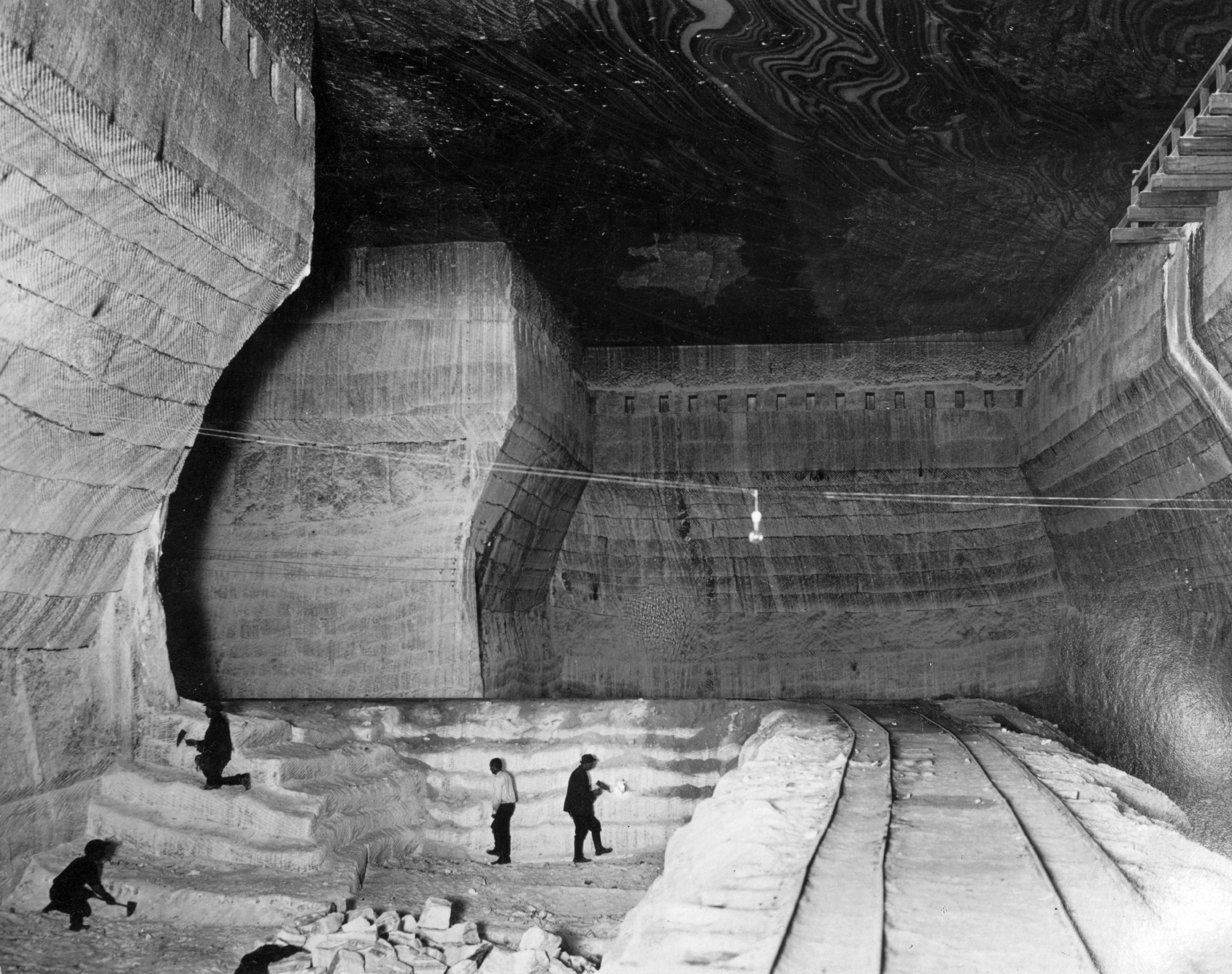 Salina Ocna Mureş, mina Regina Maria (1930).